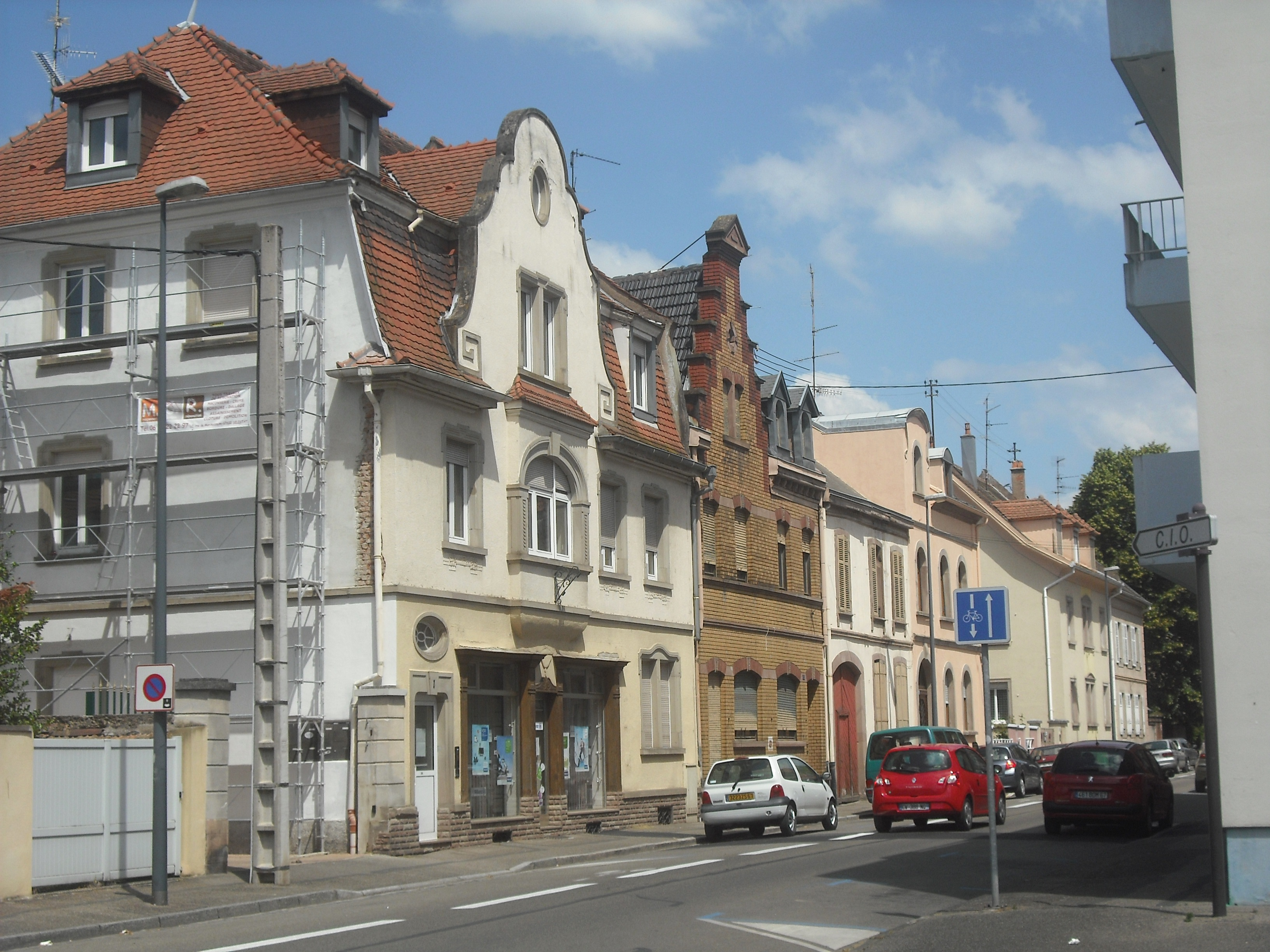 Rue du Général Gouraud, Sélestat, Bas-Rhin, France.